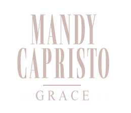 Mandys Albumlogo